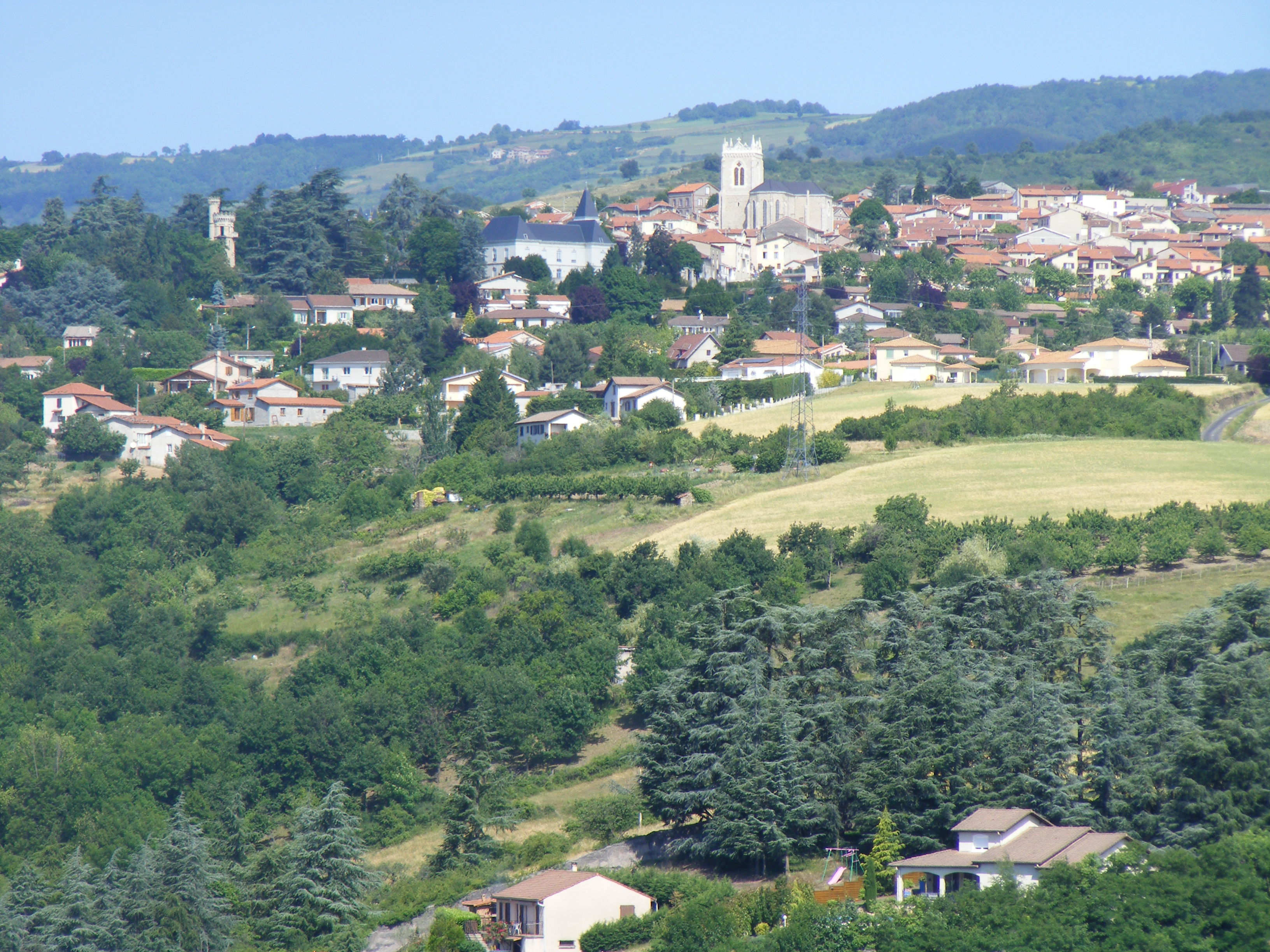 Vue générale Saint-Martin-la-Plaine